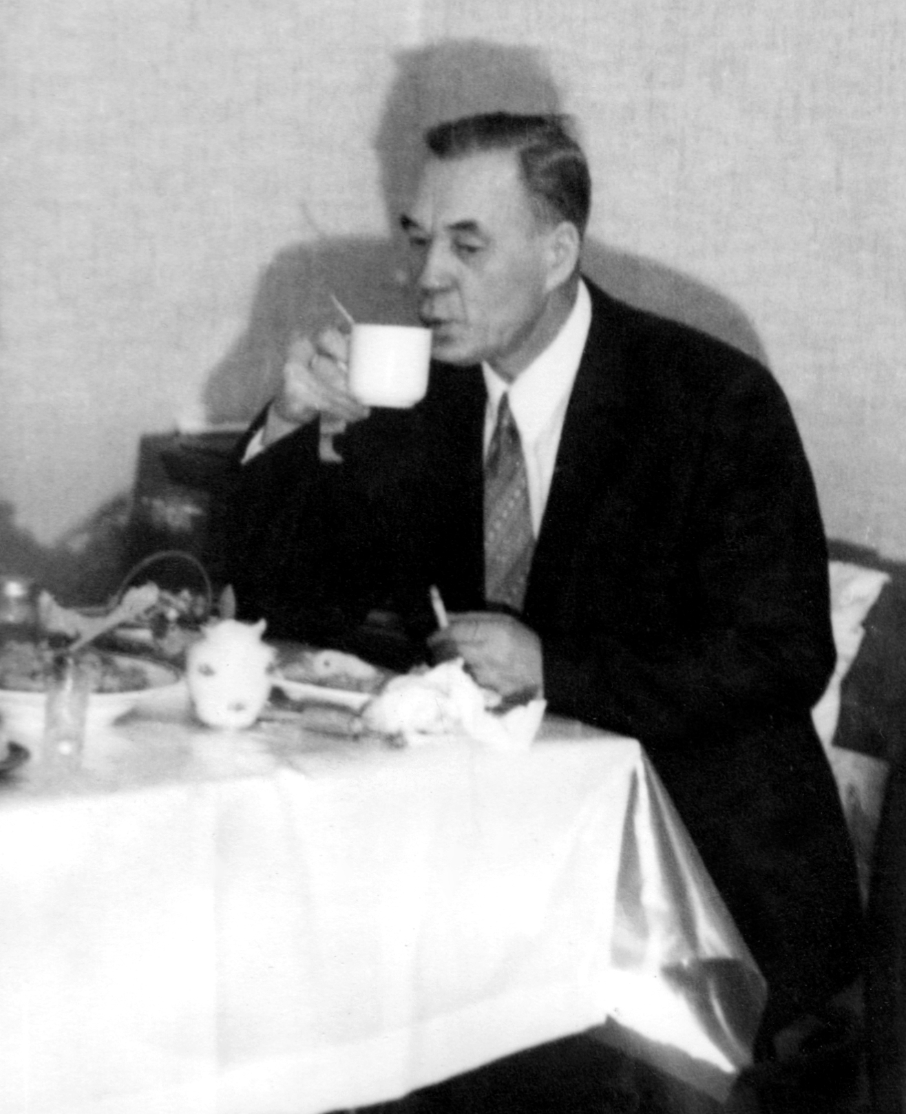 Александр Иванович Маркин